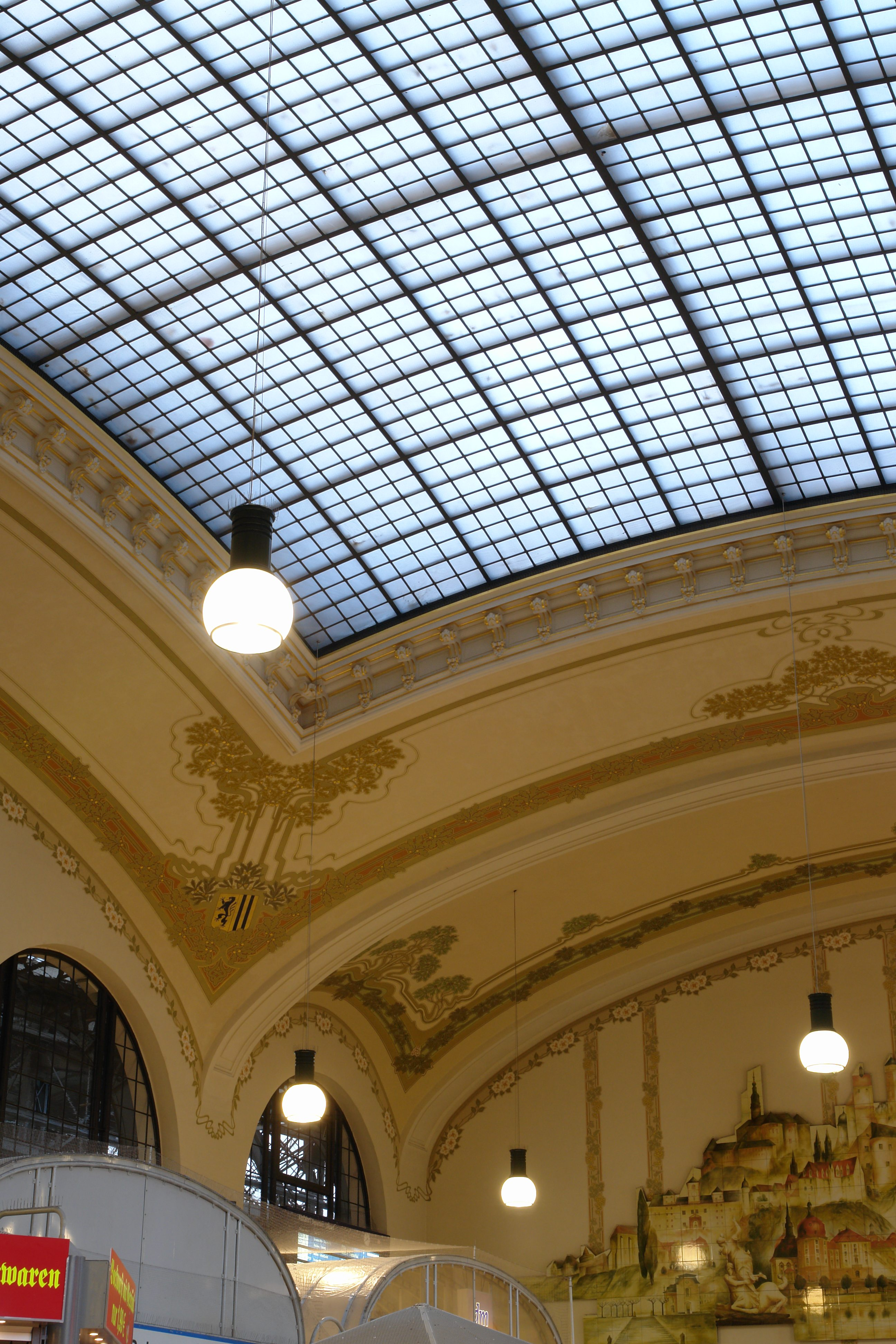 Trainstation in Dresden-Neustadt, Germany Eingangshalle